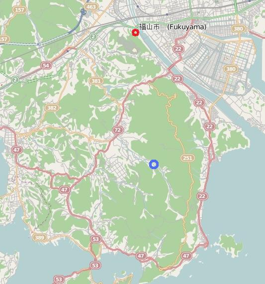 沼隈半島。2012年10月現在の地図。赤丸が佐波浄水場、青丸が熊野ダム。 This map may be incomplete, and may contain errors. Don't rely solely on it for navigation.